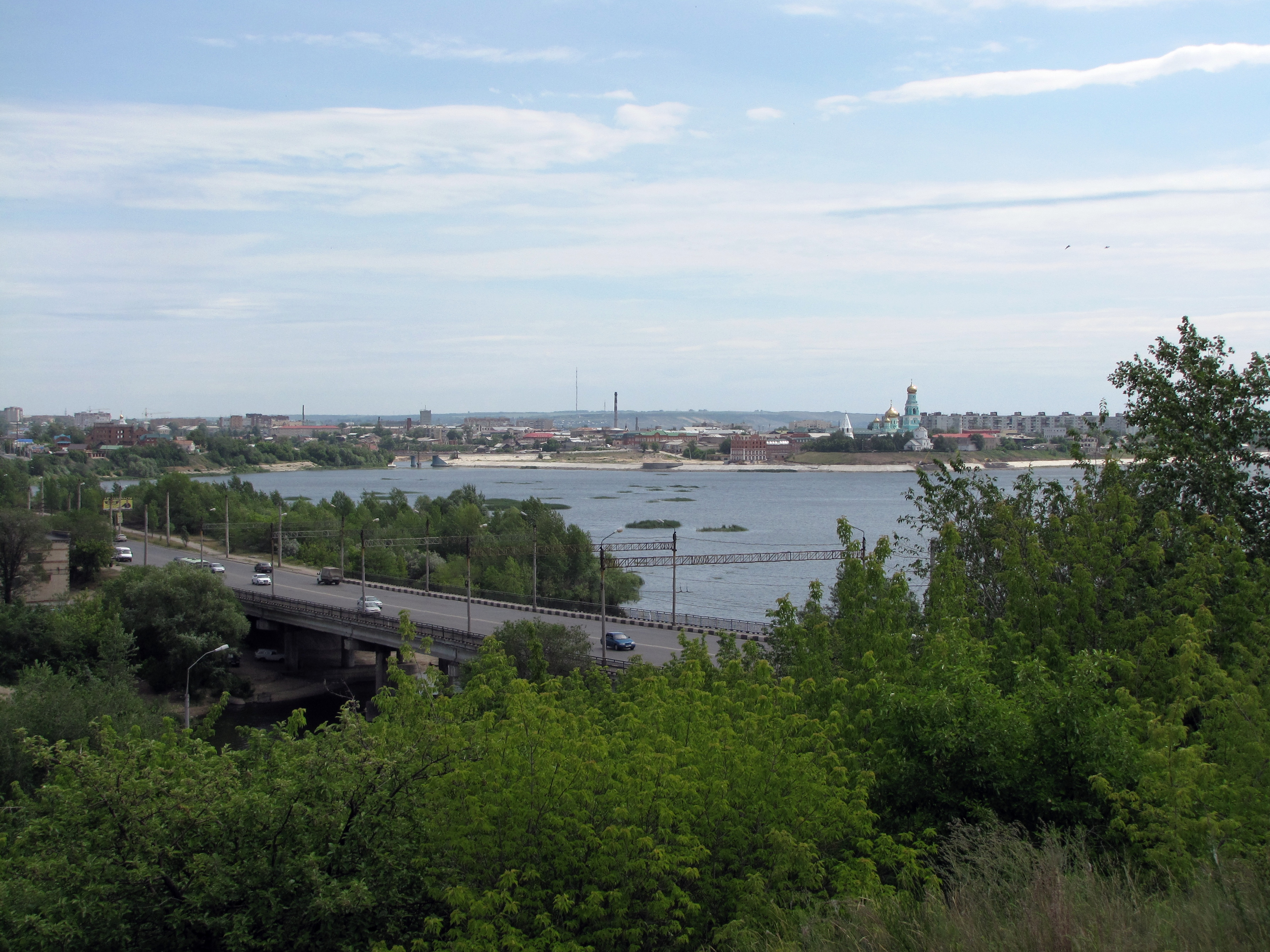 Сызрань